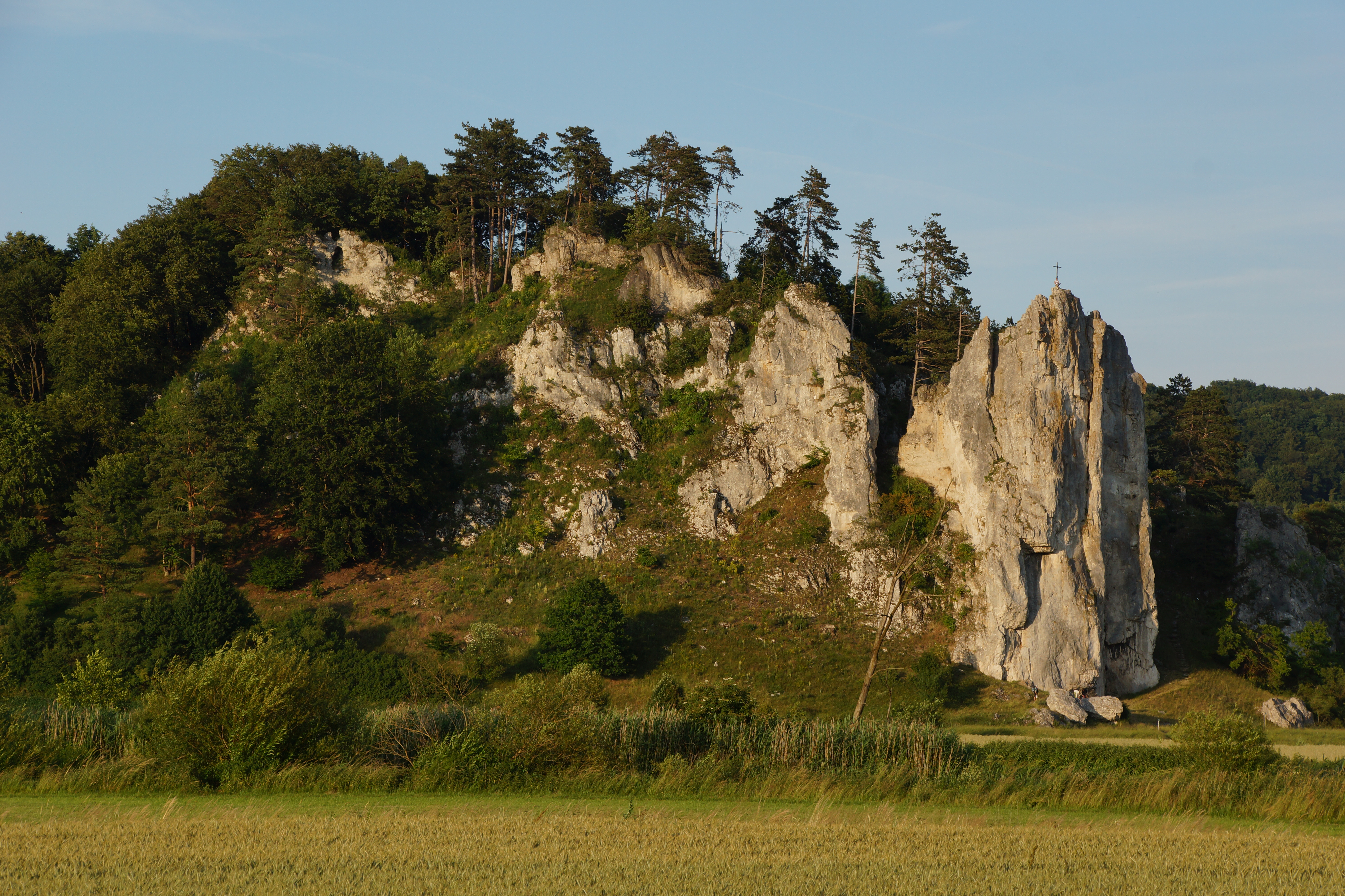 Das Altmühltal unterhalb von Dollnstein